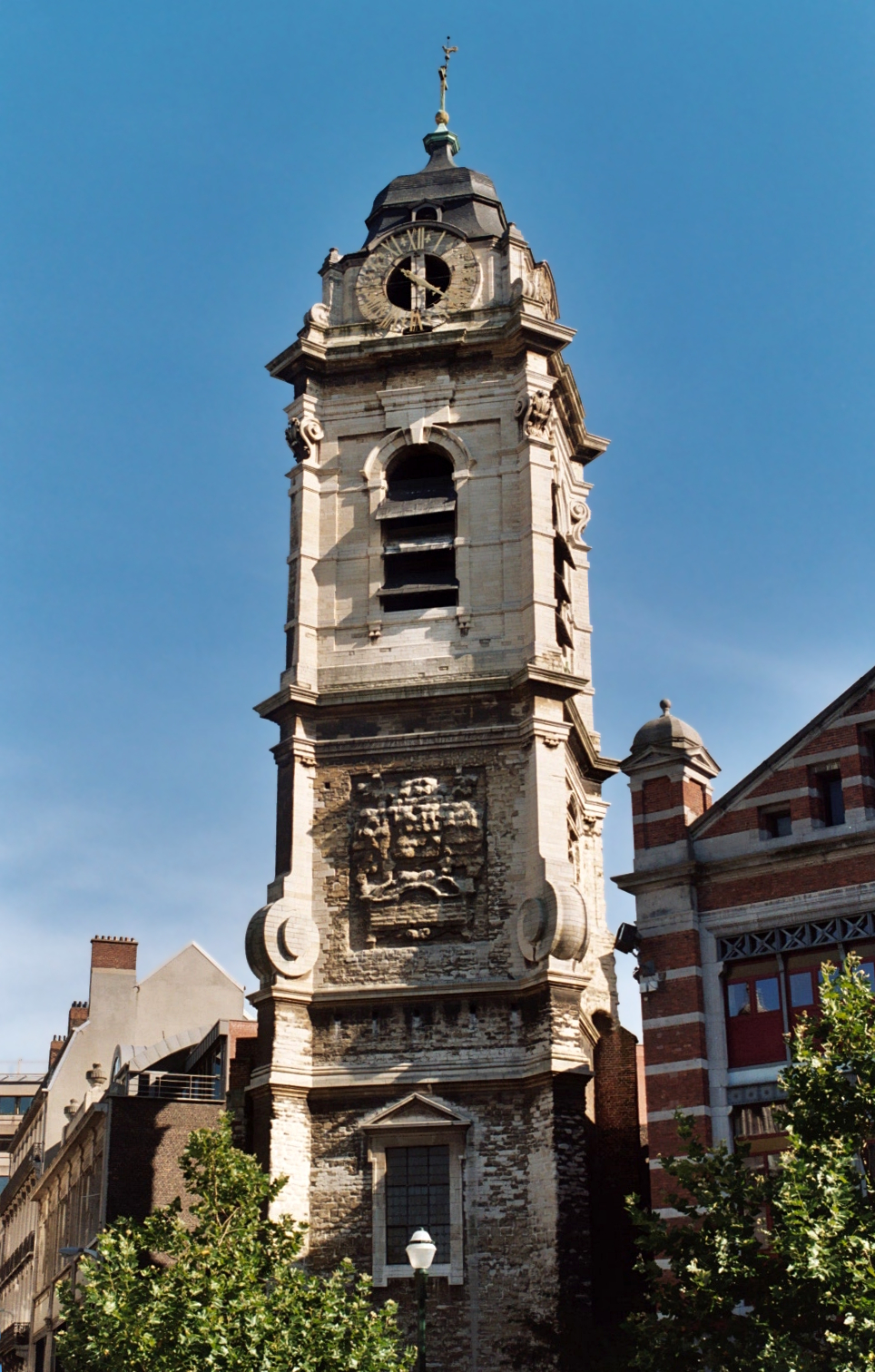 Belgique - Bruxelles - Tour de l'ancienne église Sainte-Catherine de Bruxelles